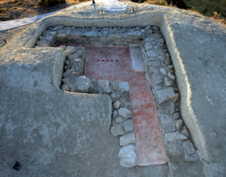 Sepultura 50 de la Necrópolis Ibérica de Tútugi